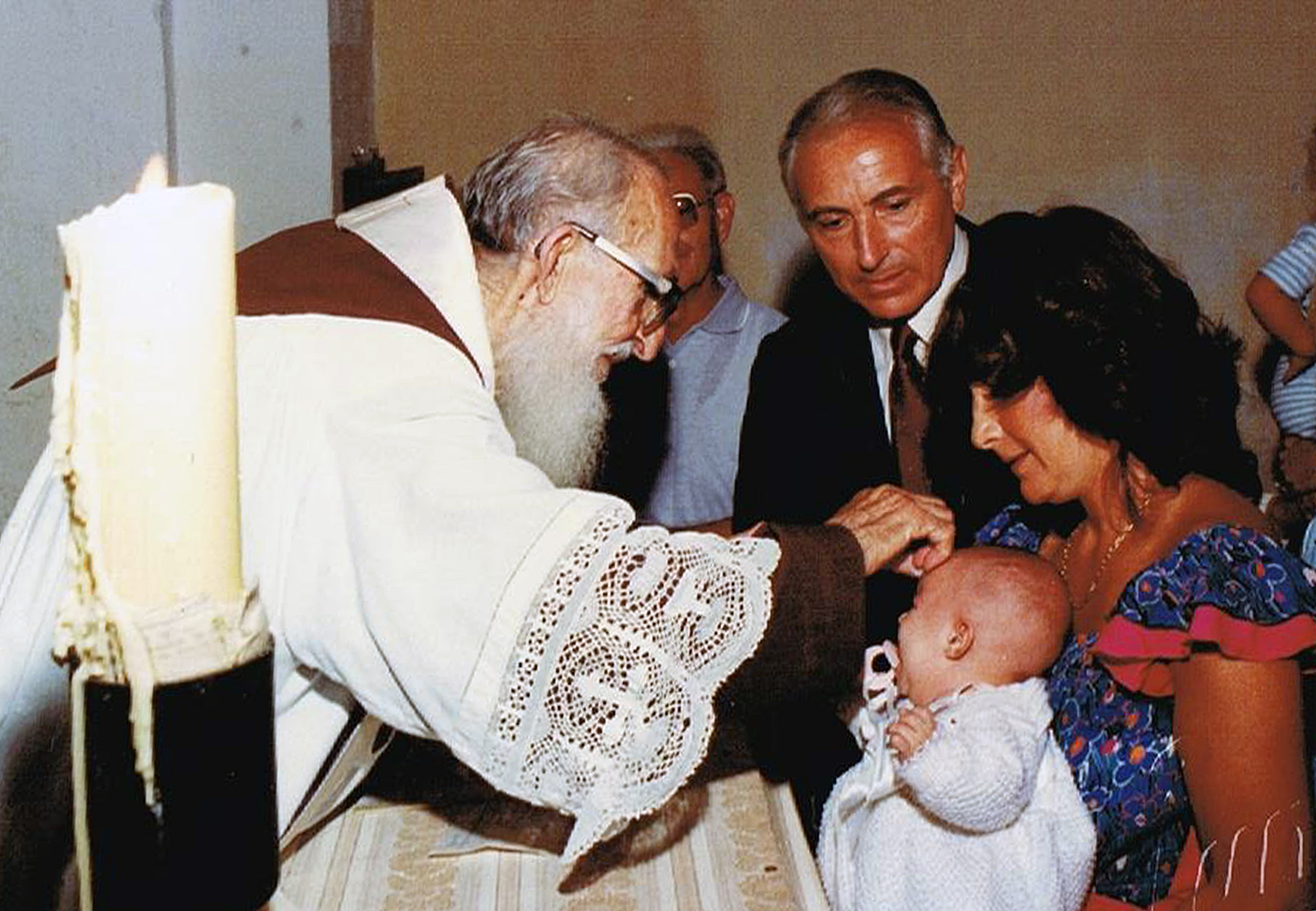 Padre Domingo de Tacuarembó nació el 18 de mayo de 1899 en Paso de los Toros, departamento de Tacuarembó Uruguay